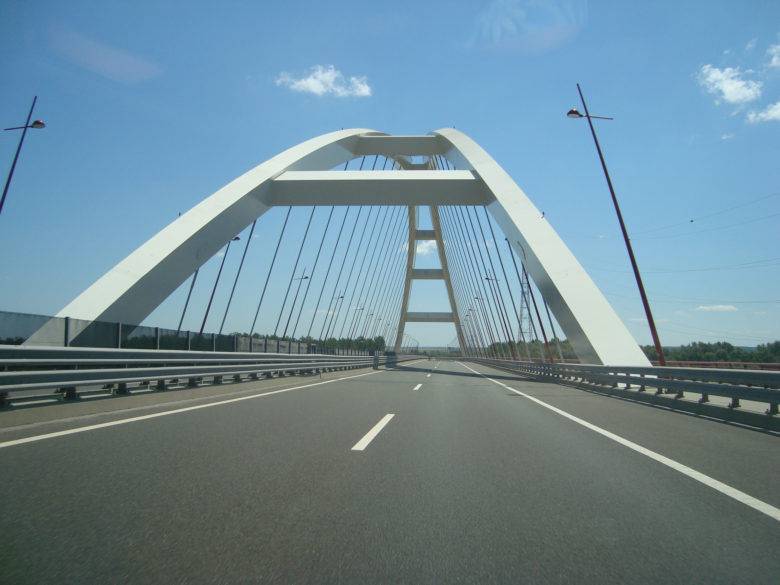 Pentelei-híd